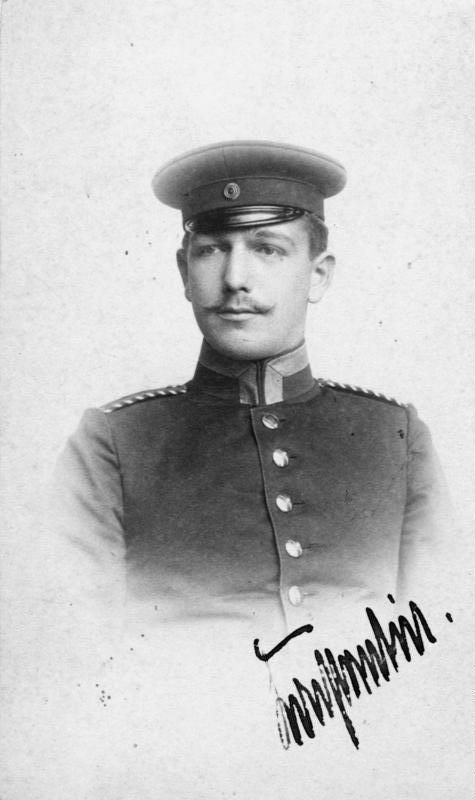 Konstantin von Neurath Porträt Konstantin Freiherr von Neurath in Uniform (Einjähriger Militärdienst 1893-1894?) Abgebildete Personen: Neurath, Konstantin von Freiherr: Außenminister, Reichsprotektor für Böhmen und Mähren, Deutschland (GND 118786016)